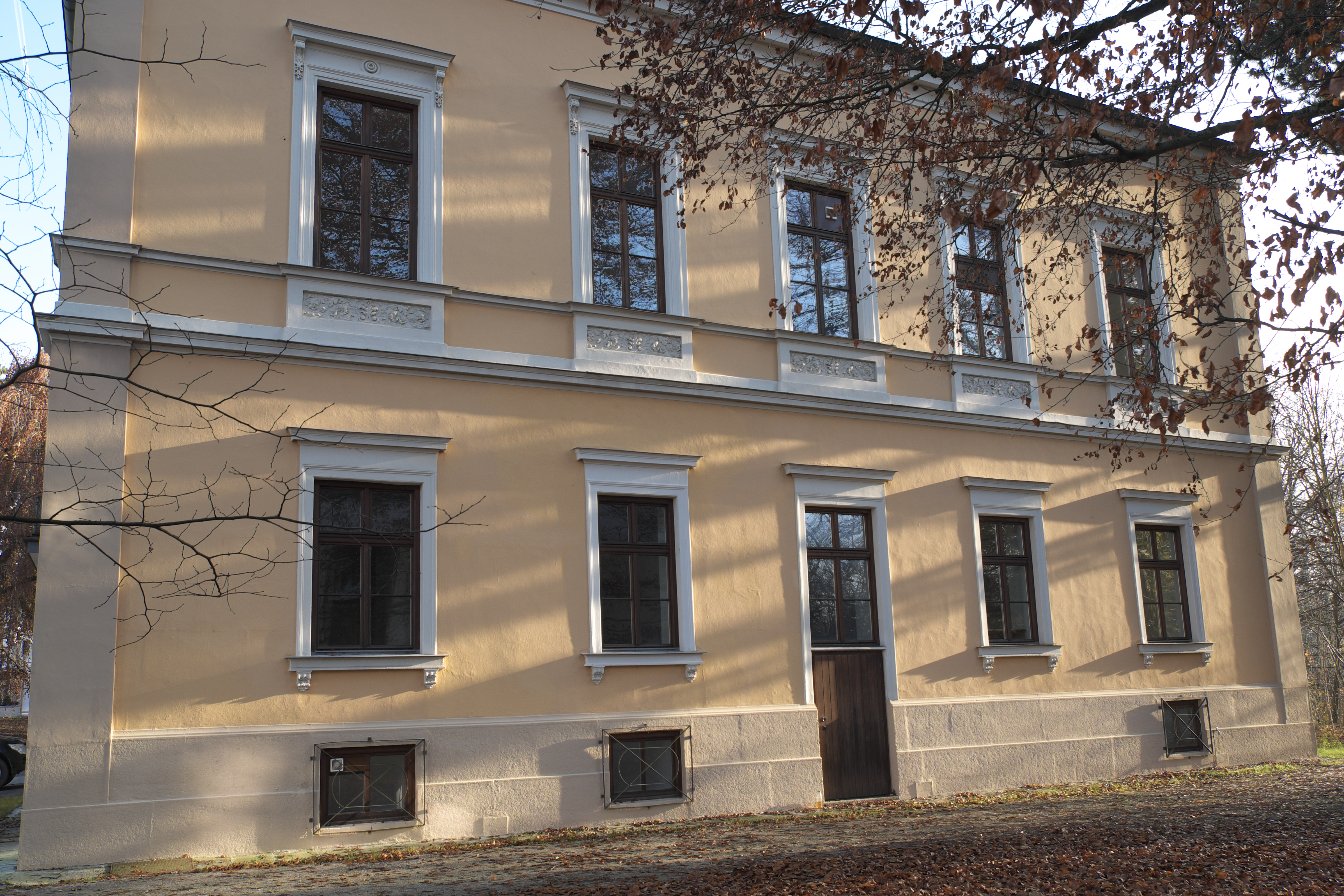 Schloss Gatterburg im Münchner Stadtteil Pasing (Bayern, Deutschland)